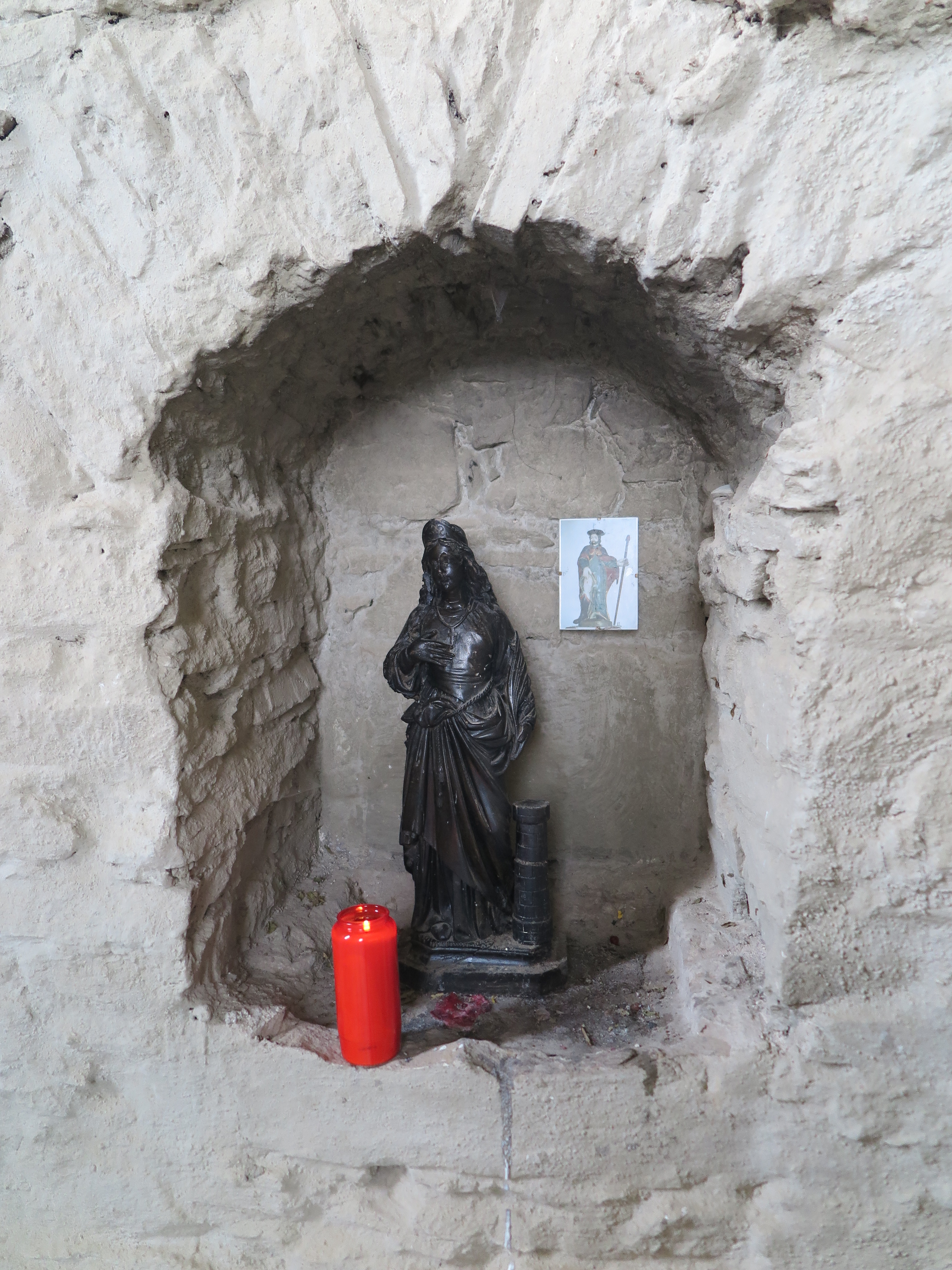 Altarnische in der Dorfkirche St. Rochus in Wollseifen.